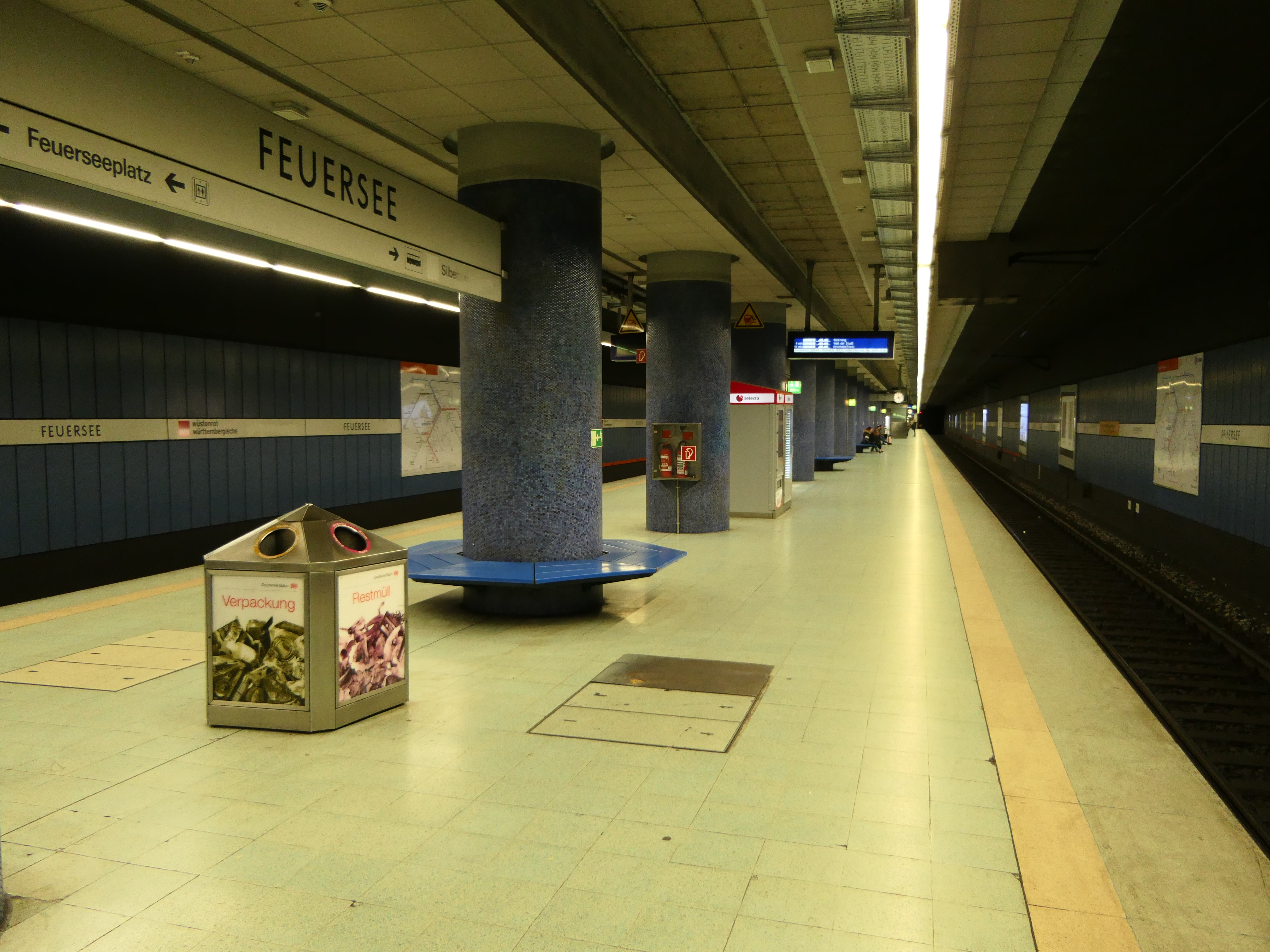 Der unterirdische S-Bahnhof Feuersee in Stuttgart.